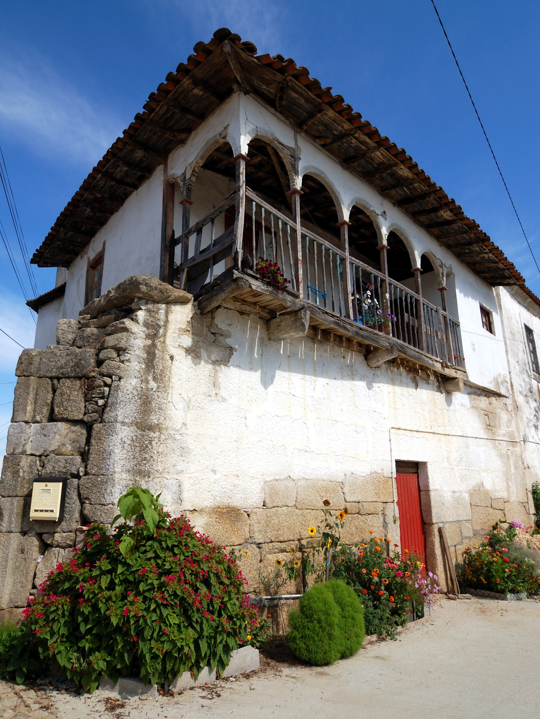 Vale de Telhas, Portugal [2007]